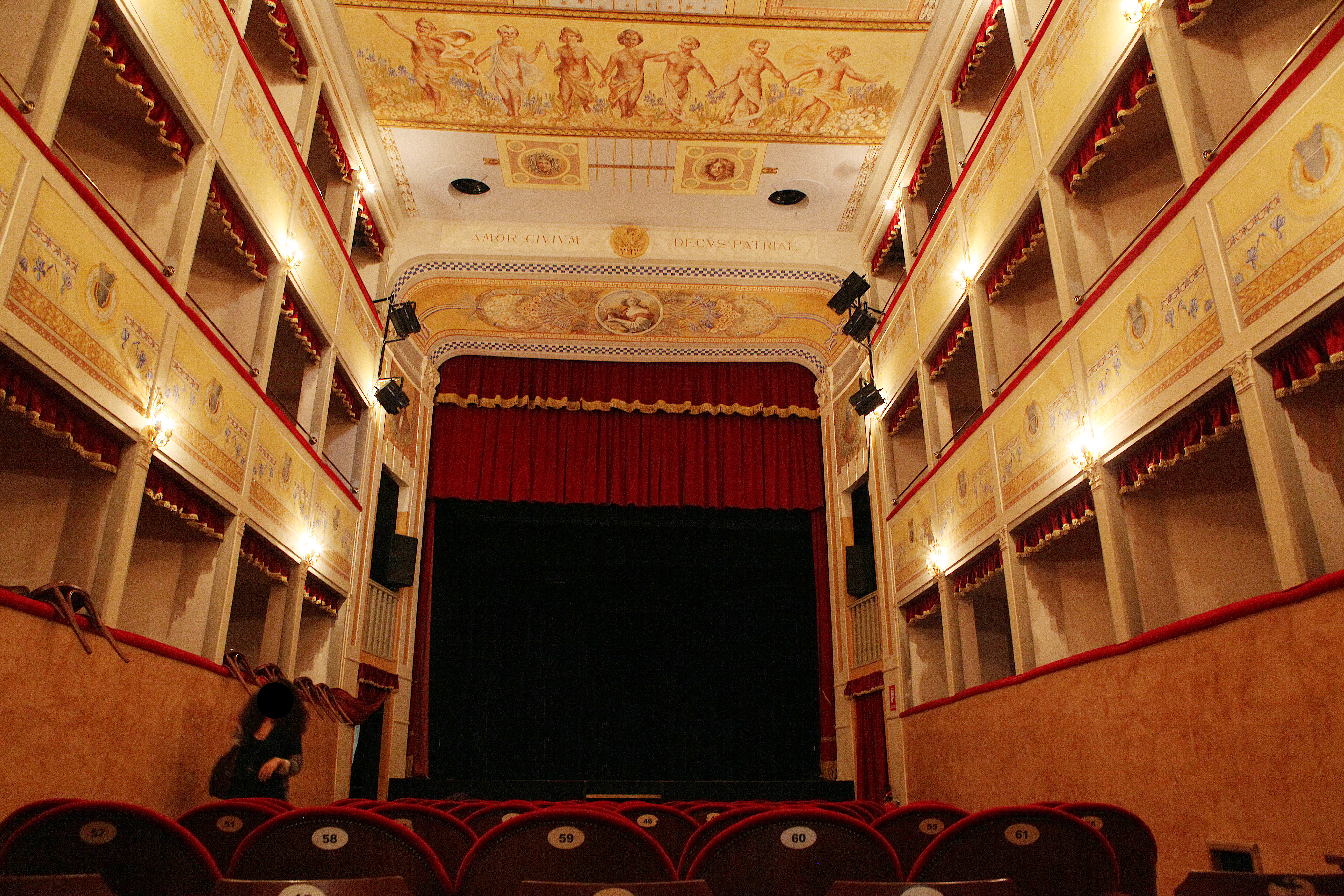 Teatro Vittoria - MIBAC This is a photo of a monument which is part of cultural heritage of Italy.